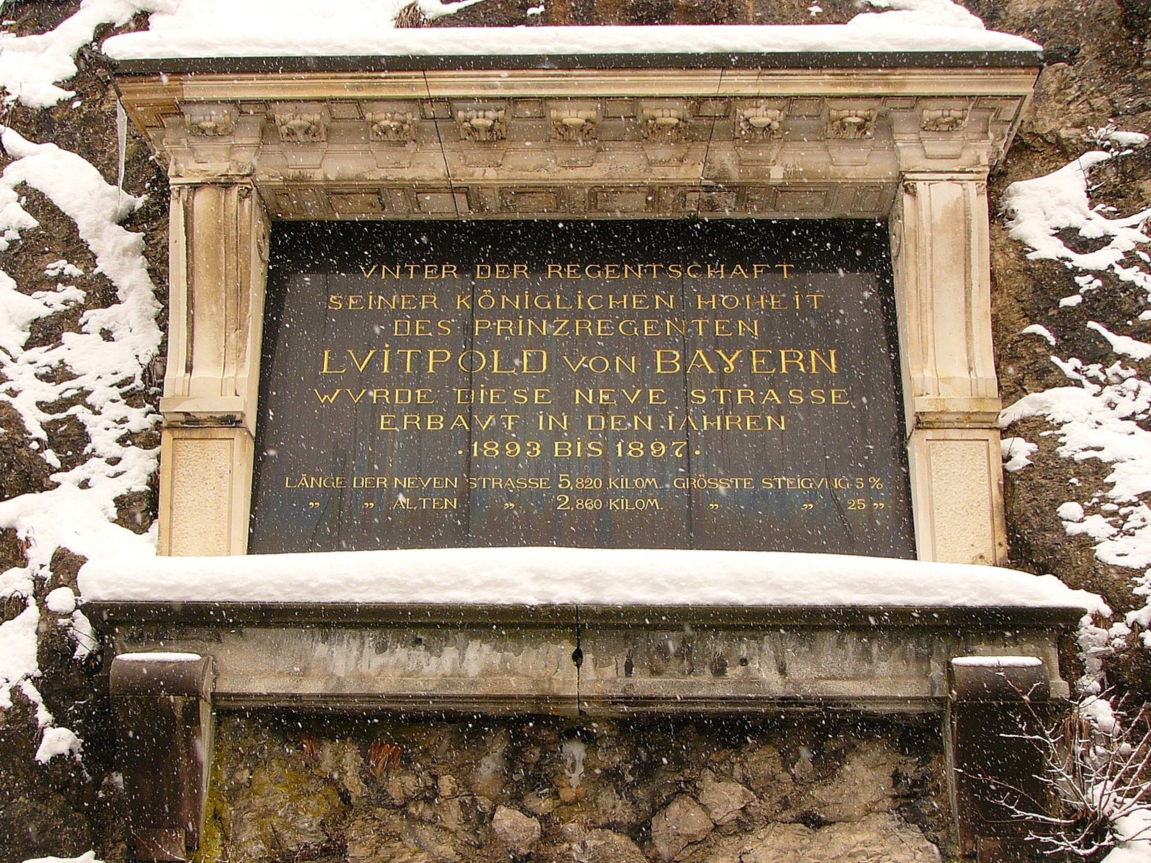 Steintafel in klassizisierender Marmorrahmung, 1893, zum Bau der Kesselbergstraße.This is a photograph of an architectural monument.